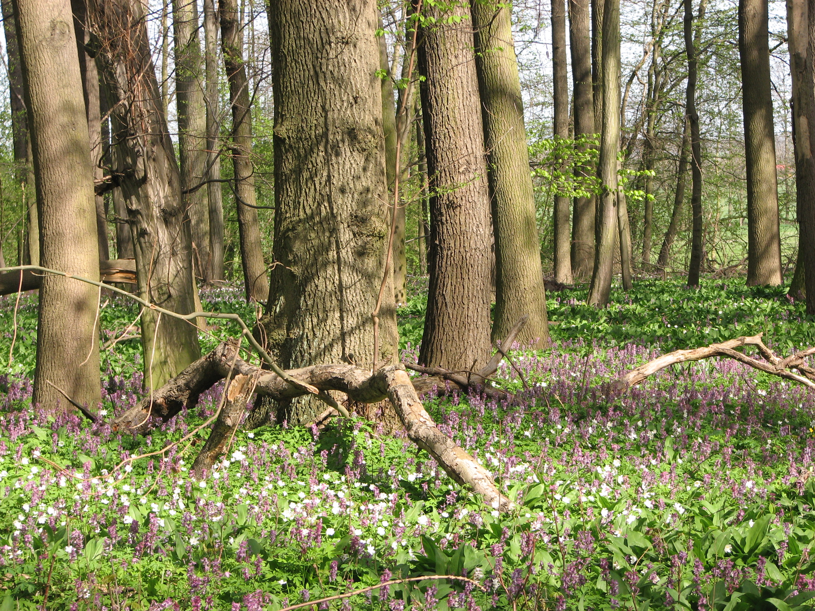 Naturschutzgebiet „Langes Holz–Radeland“ (NSG L 14) im Landkreis Nordsachsen (Nähe Lampertwalde?) – Dieses Naturschutzgebiet ist ein Restauwald mit seltenen Frühblühervorkommen, z.B. Märzenbecher und Lerchensporn.